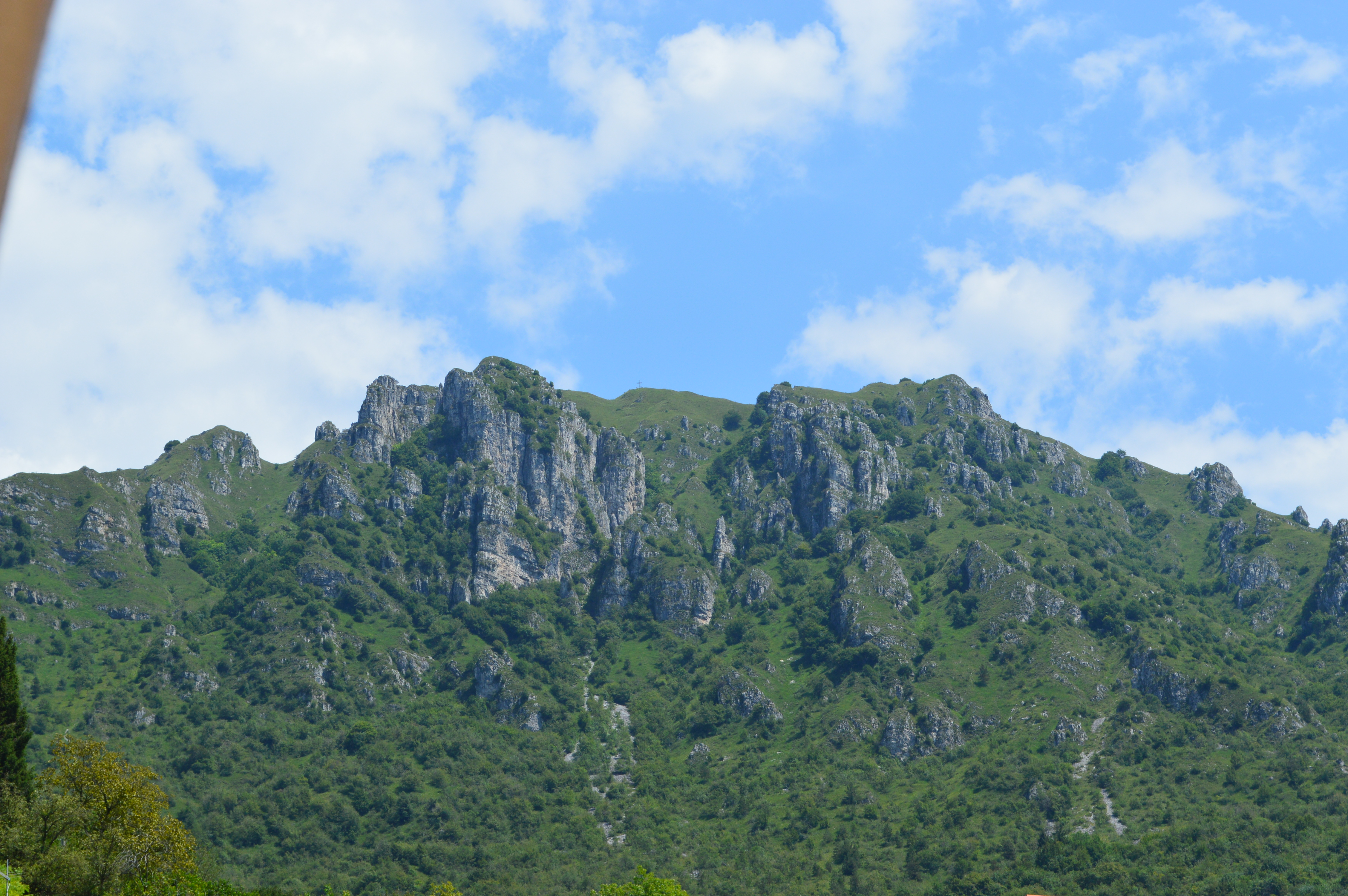 Il monte Palo visto dall'abitato di Lodrino (BS) - Italia